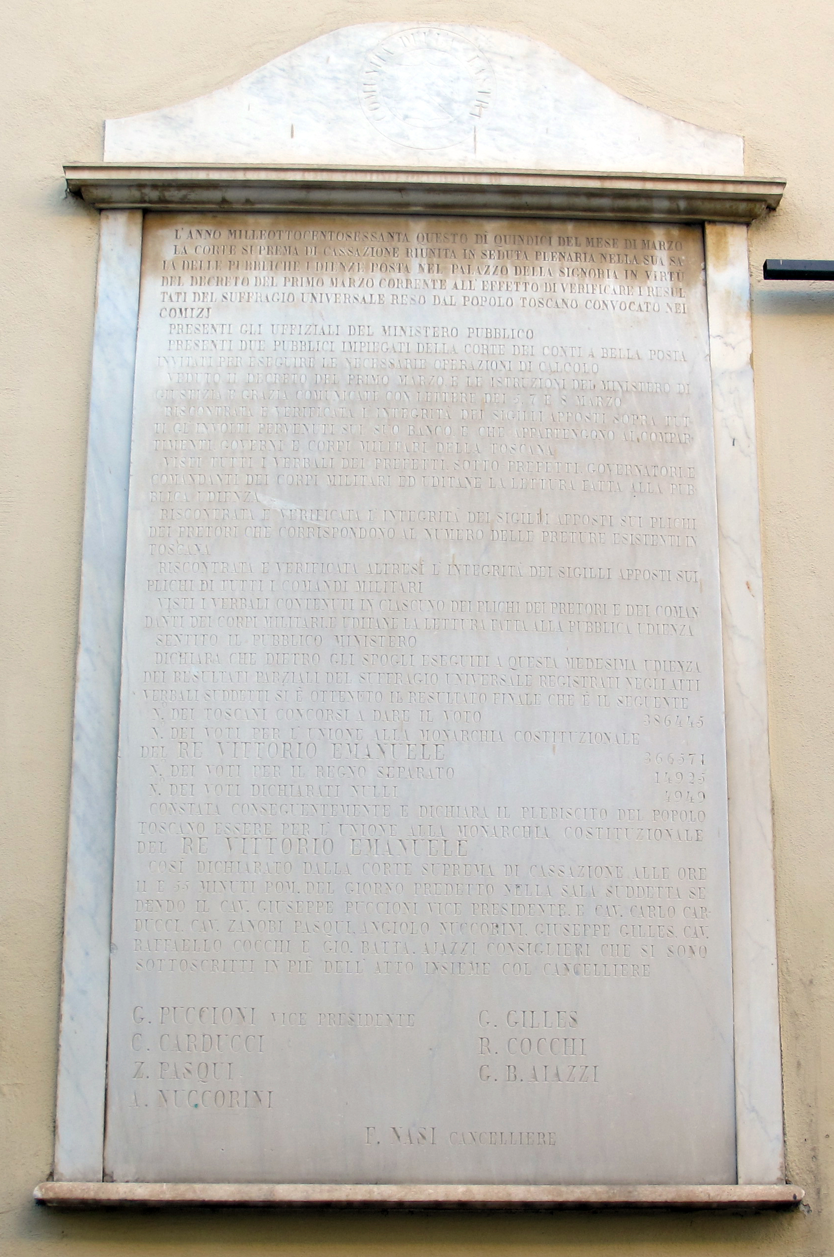 Town hall (Lastra a Signa)